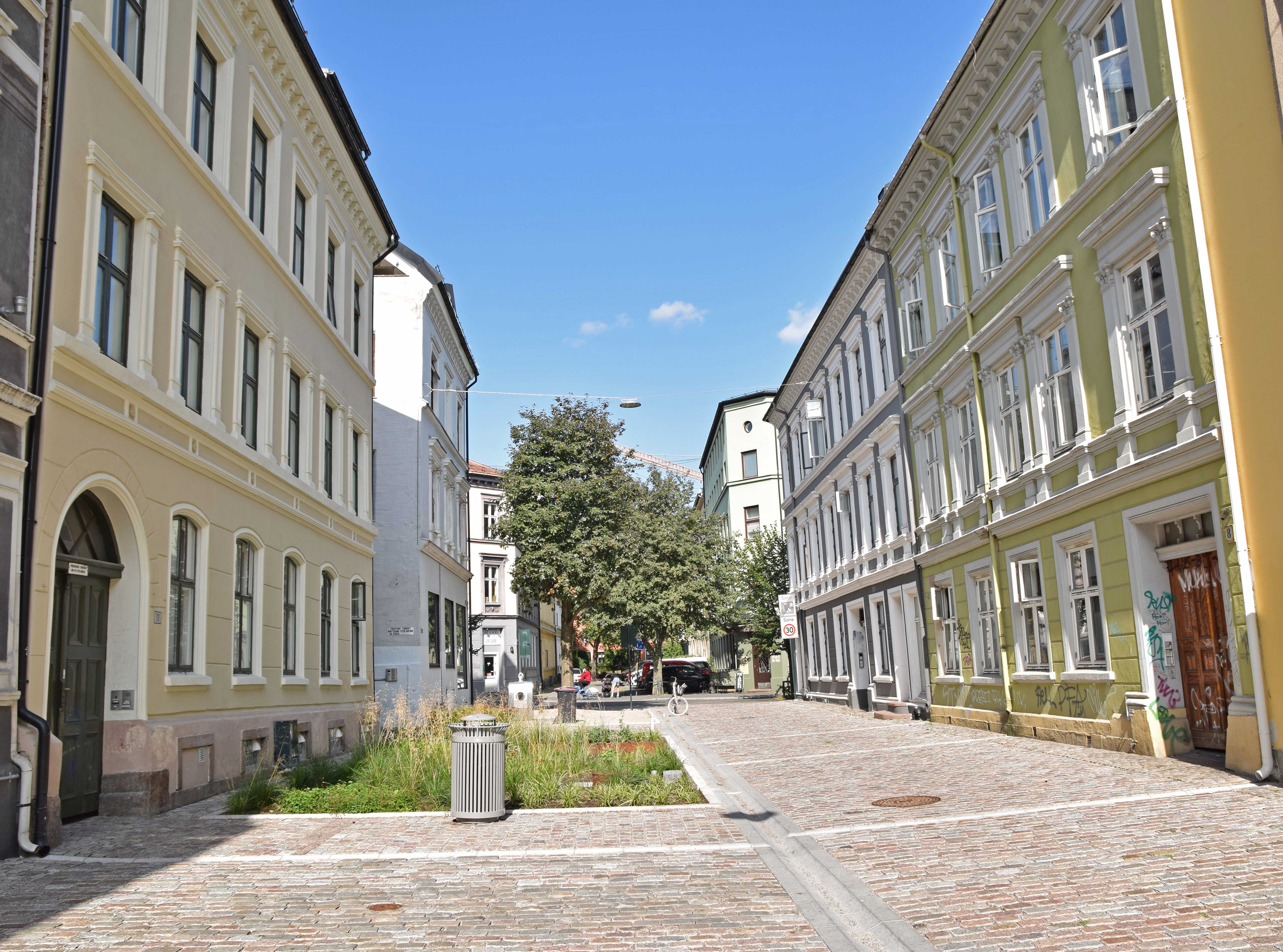 Deichmanns gate sett mot Rosteds gate med nytt gategulv 2017